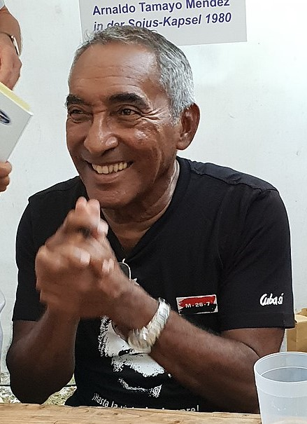 Arnaldo Tamayo Berlim 2018